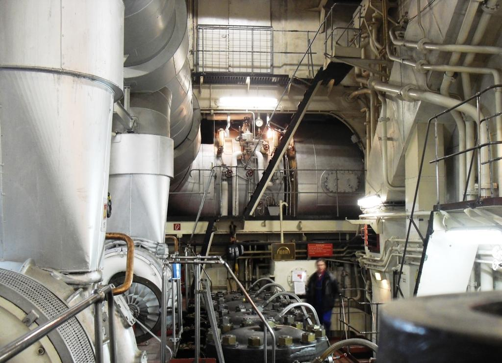 Schiffsmaschinenraum, hinten oben der Abgaskessel